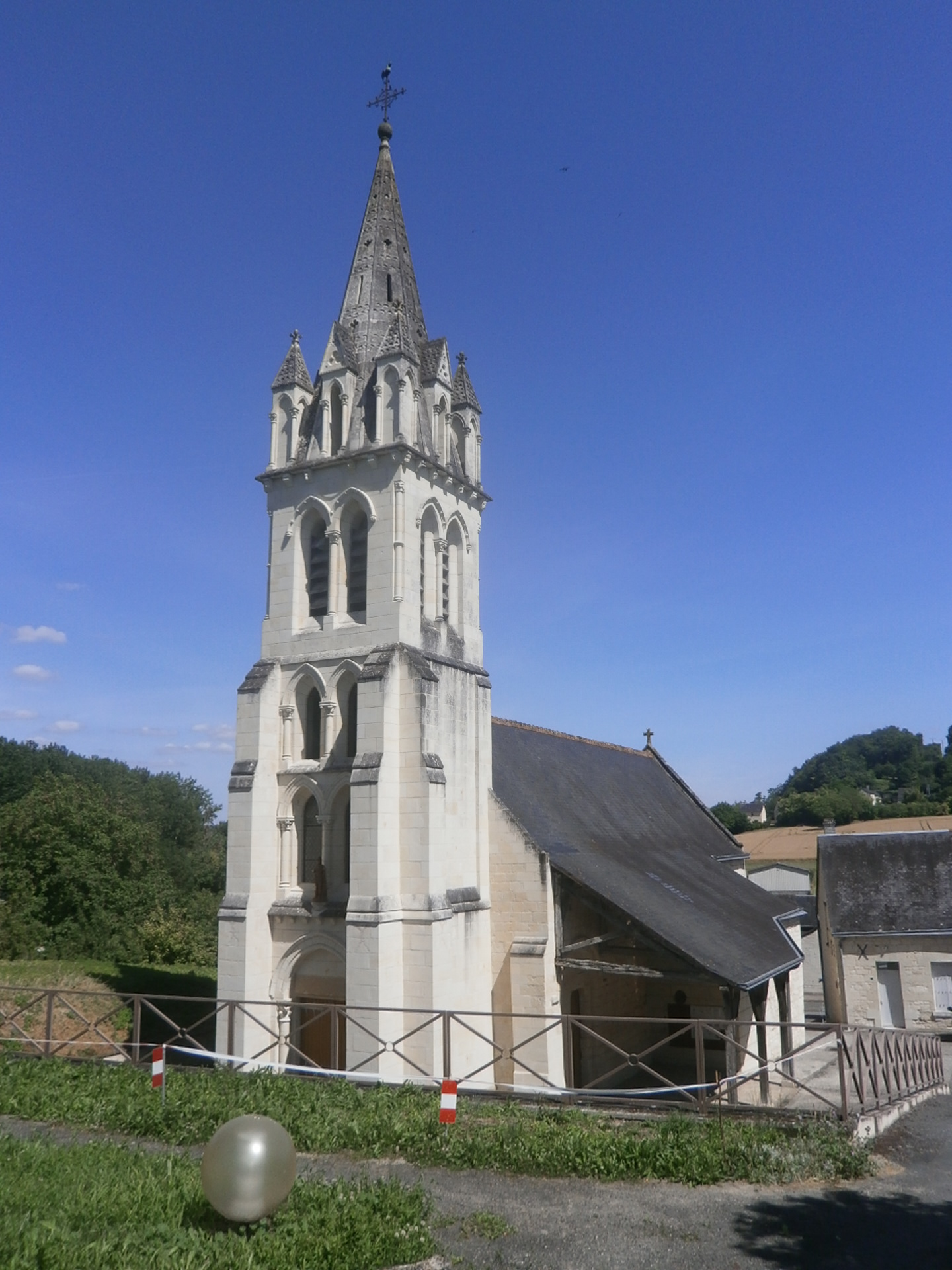 L'église de Thizay